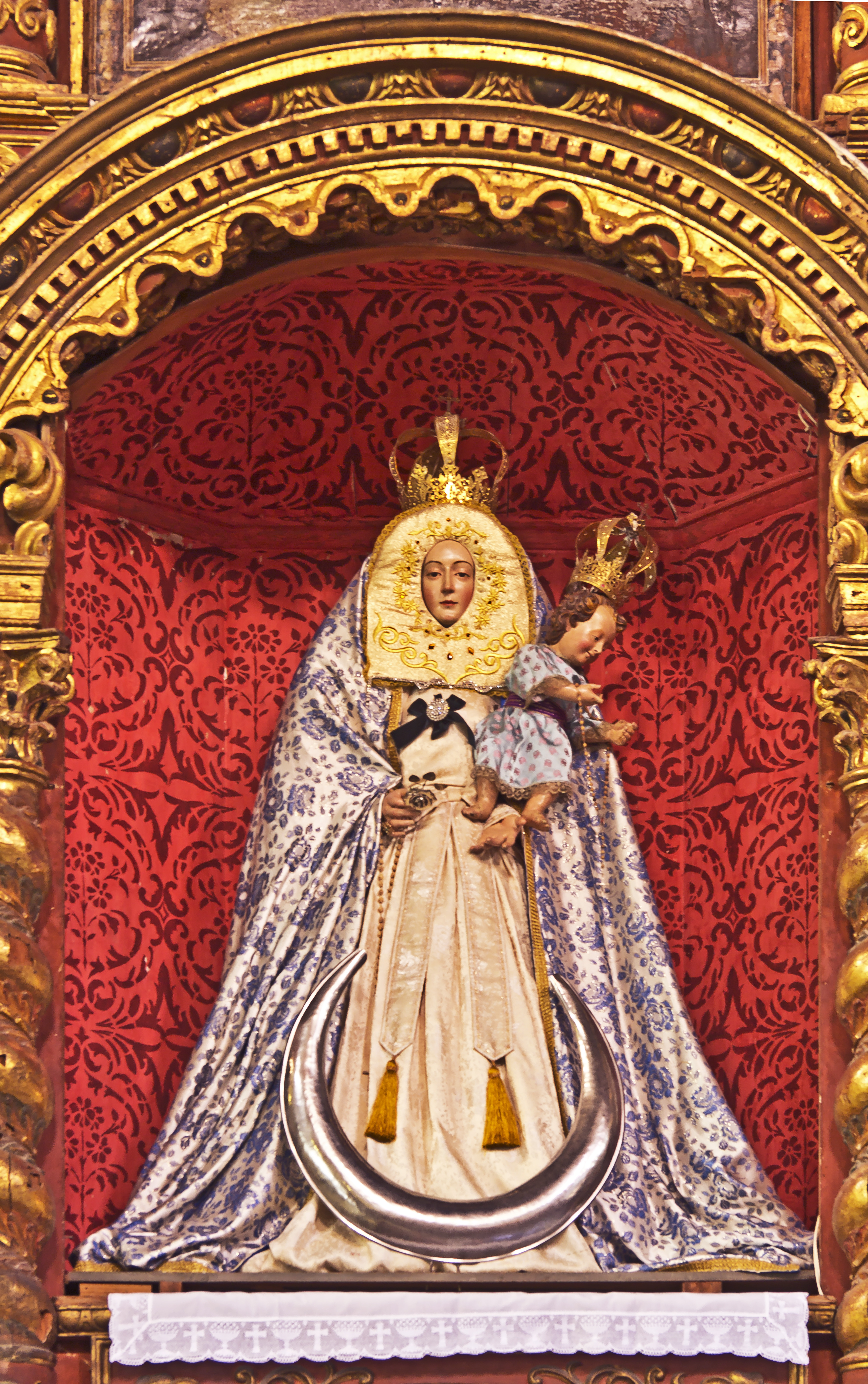 Figur der Jungfrau des Trostes in dem gleichnamigen Altar der Kirche San Francisco in Santa Cruz de Tenerife